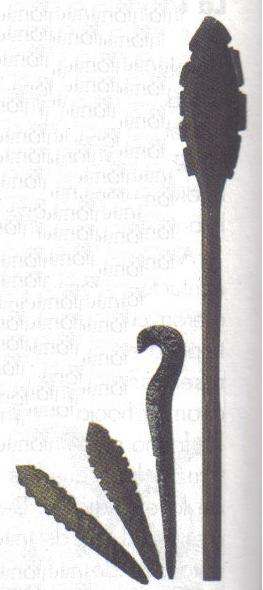 Armas aztecas